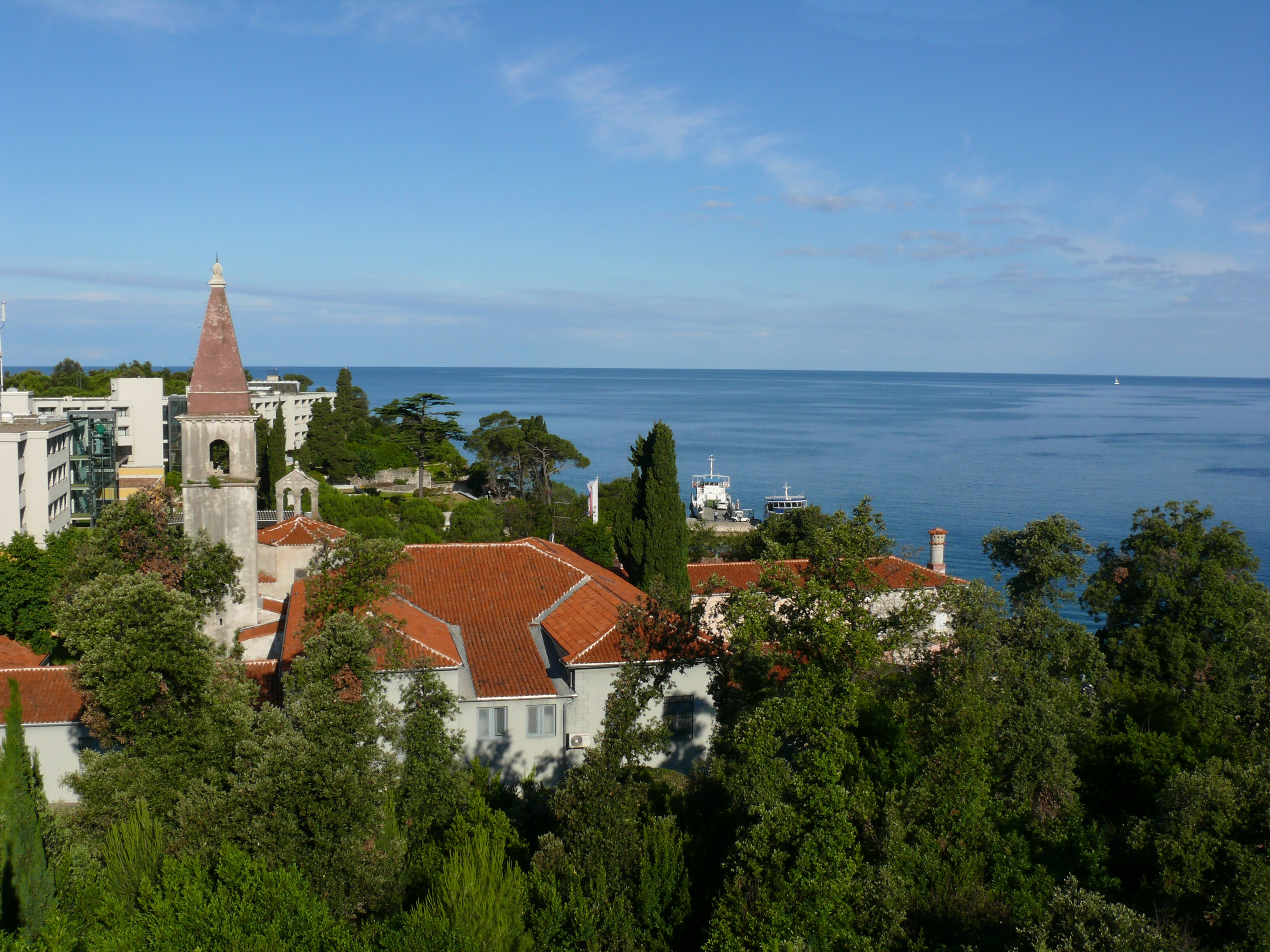 Insel Sv. Andrija vor Rovinj